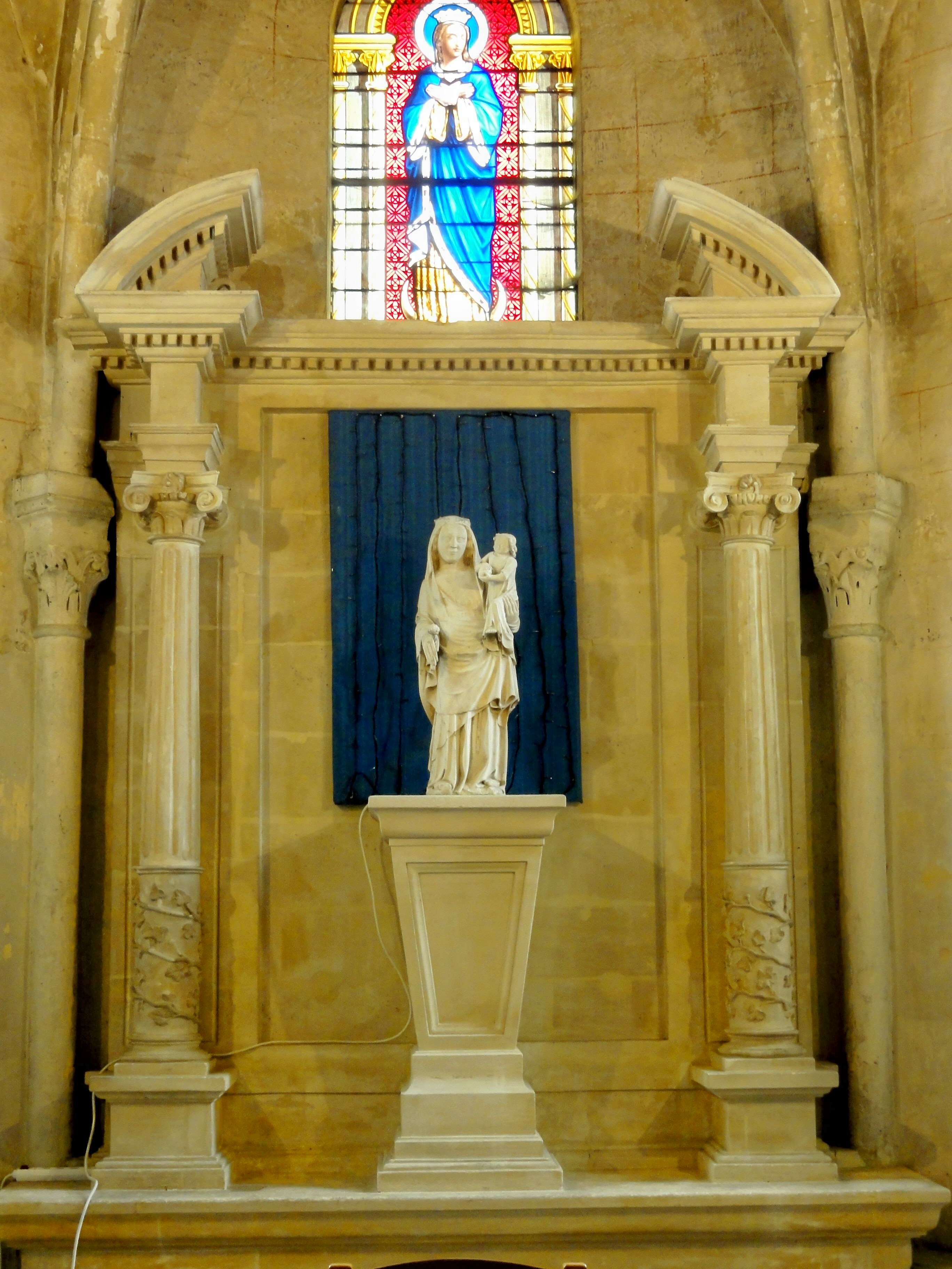 Retable du chœur.